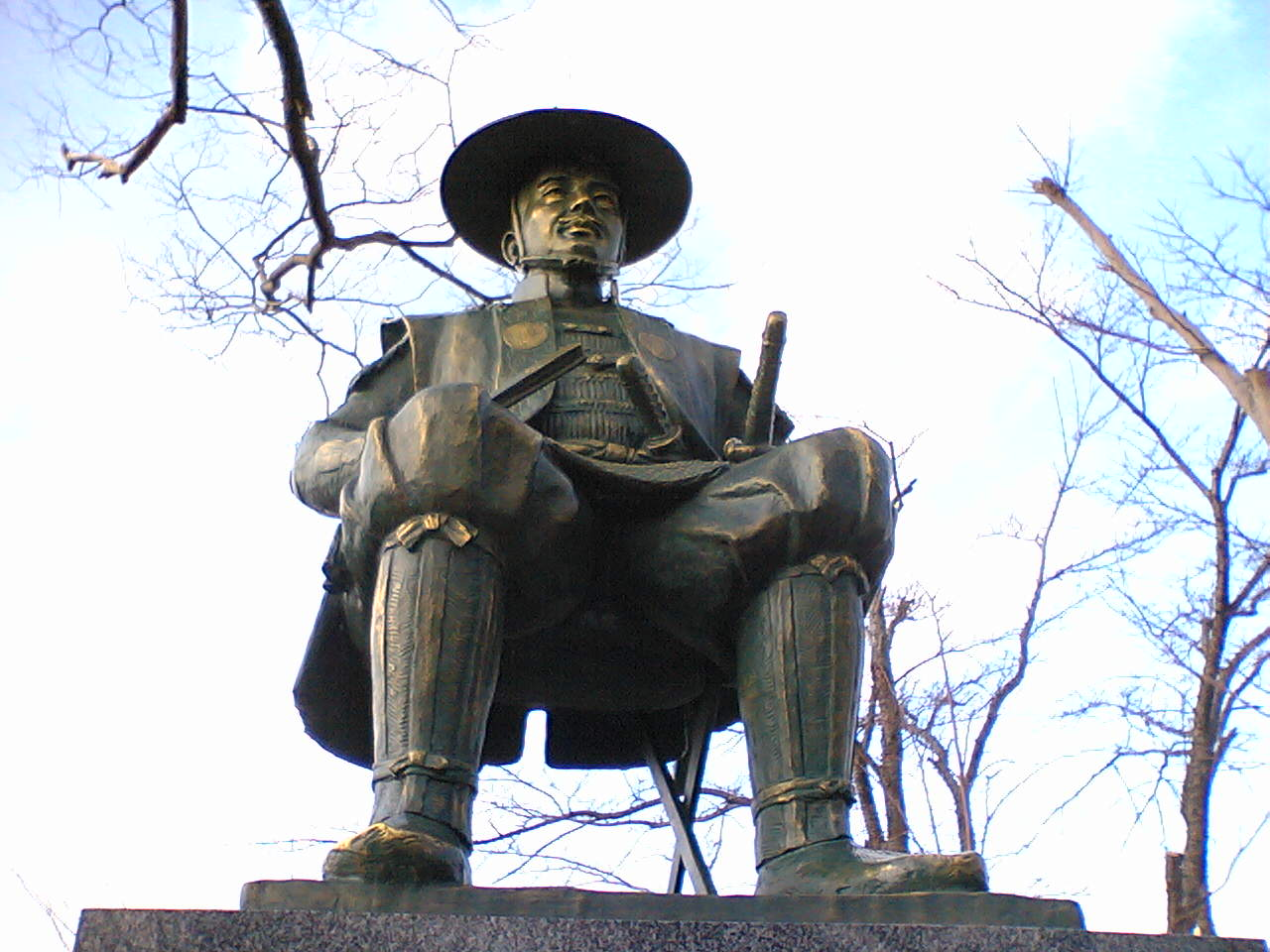 南部直房の像（八戸市内丸） (NANBU NAOFUSA NO ZOU - UCHIMARU, HACHINOHE, AOMORI, JAPAN)